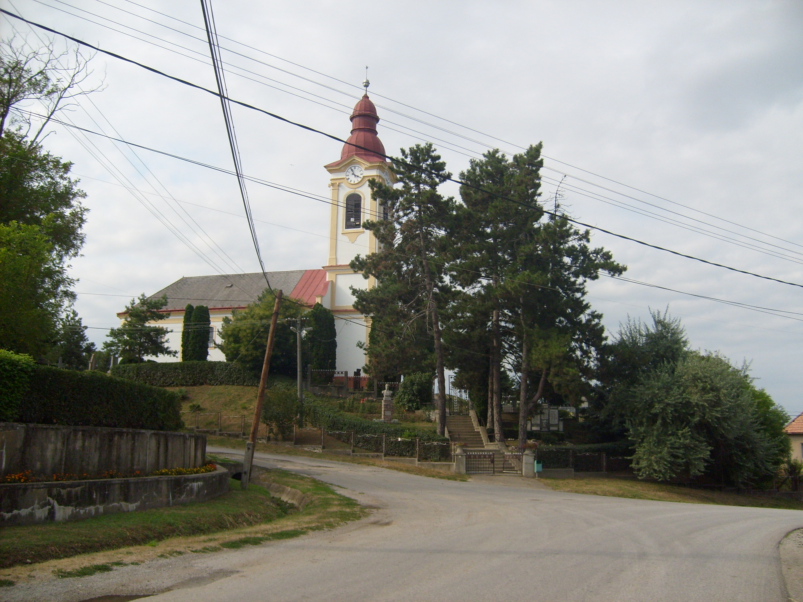 A hanvai református templom